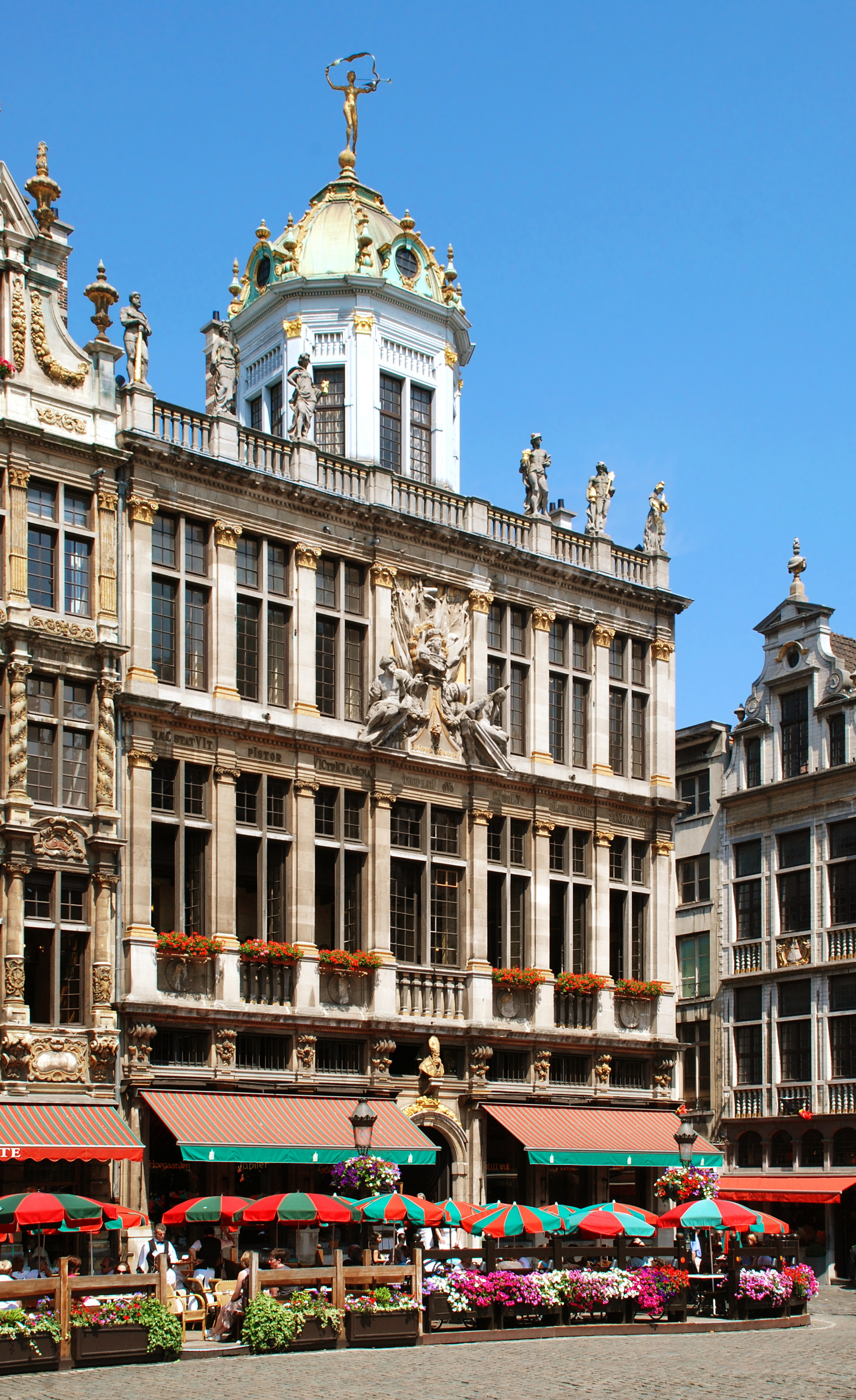 Belgique - Bruxelles - Maison du Roi d'Espagne